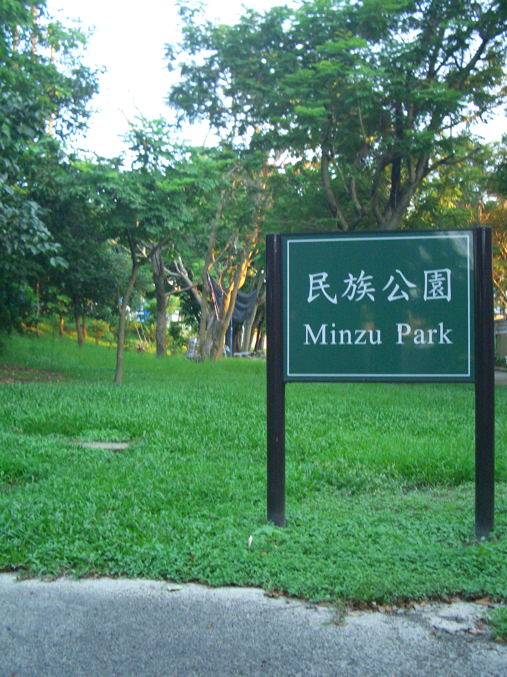 中華民國台灣台北市民族公園